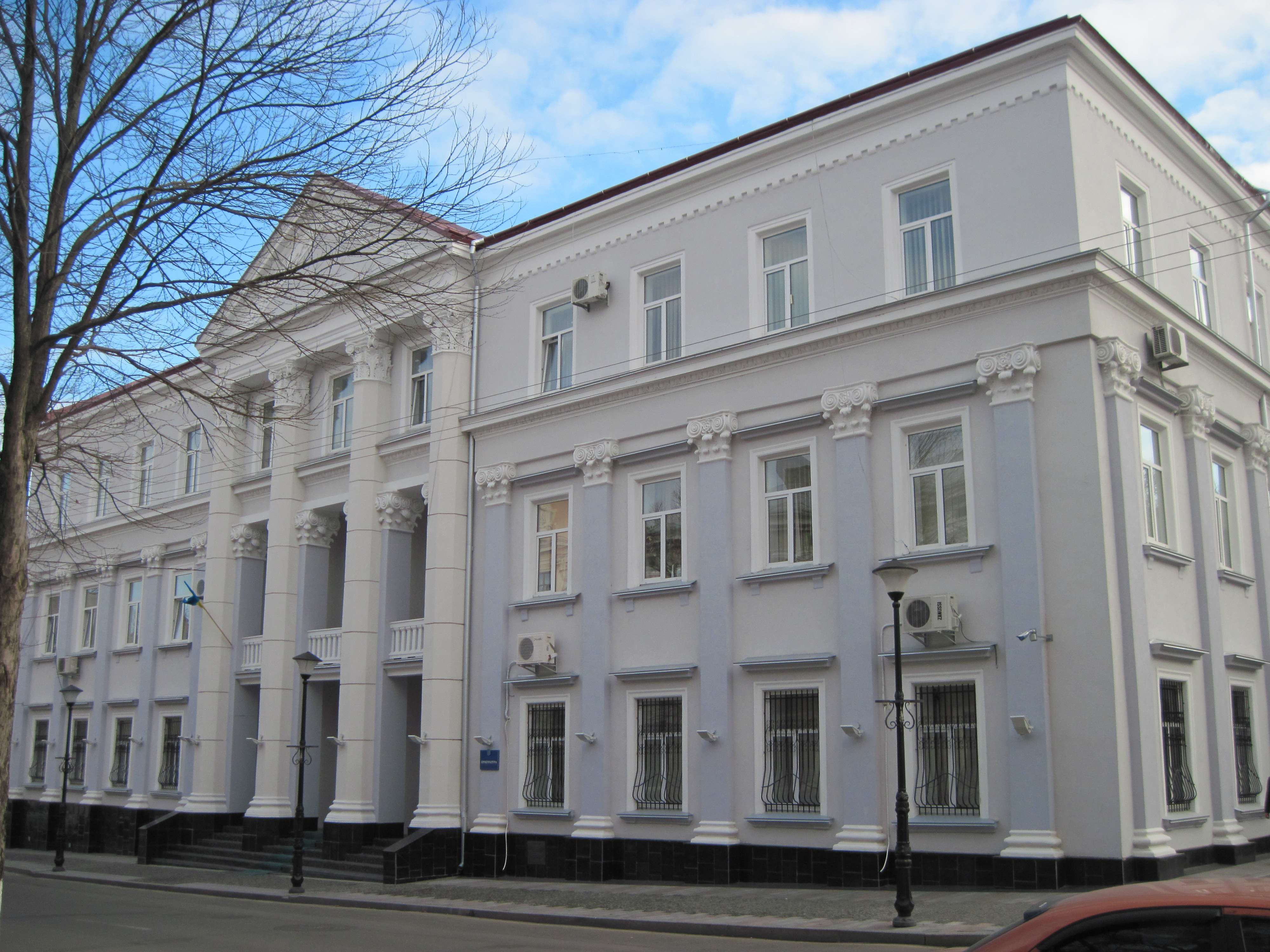 Прокуратура. Тернопіль, осінь 2013